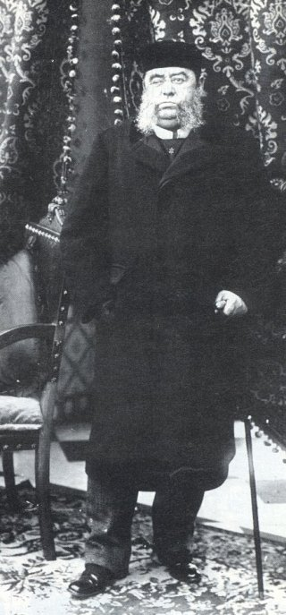 Juan Lindolfo Cuestas (1837 - 1905), político uruguayo, presidente de ese país entre 1897 y 1903.